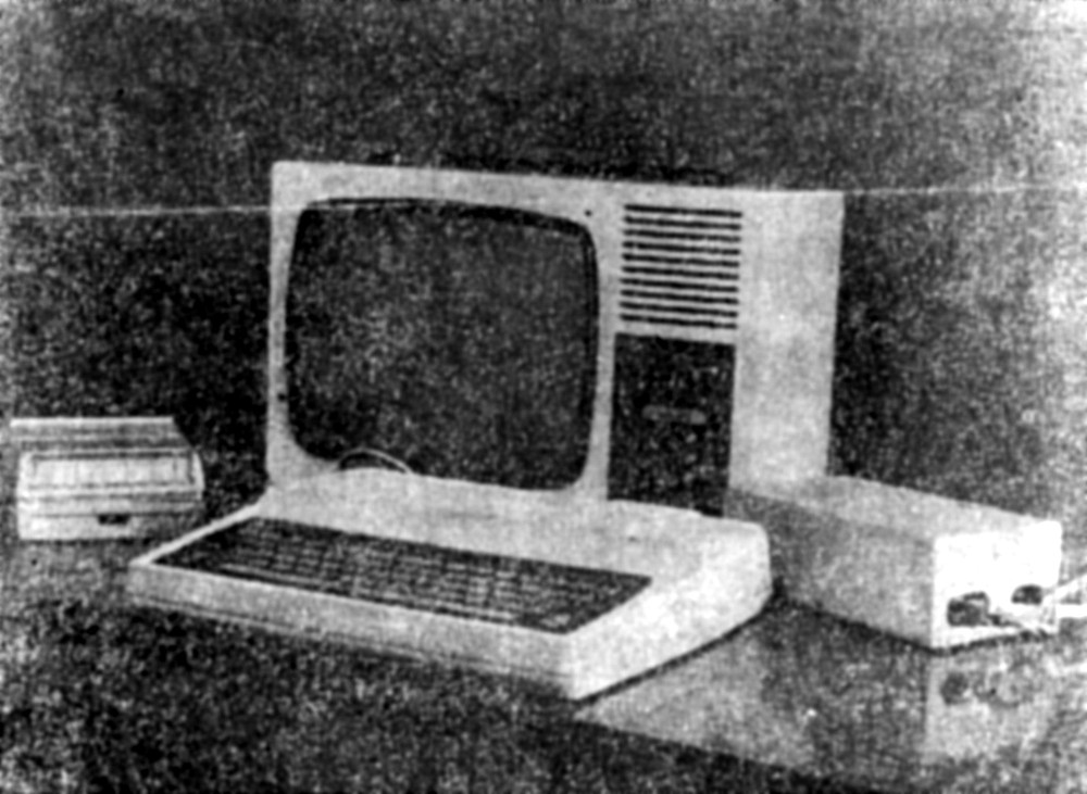 A Petrescu, Totul despre calculatorul personal aMIC